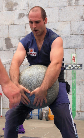 Inhar Urruzuno, Ondarroan ospatutako 2014ko Bizkaiko Txapelketan.